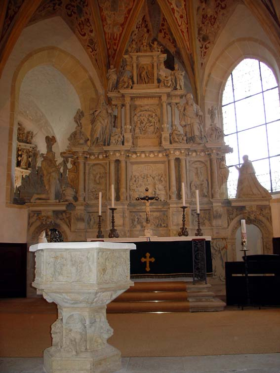 Lauensteiner Kirche, Altar Gesamtansicht